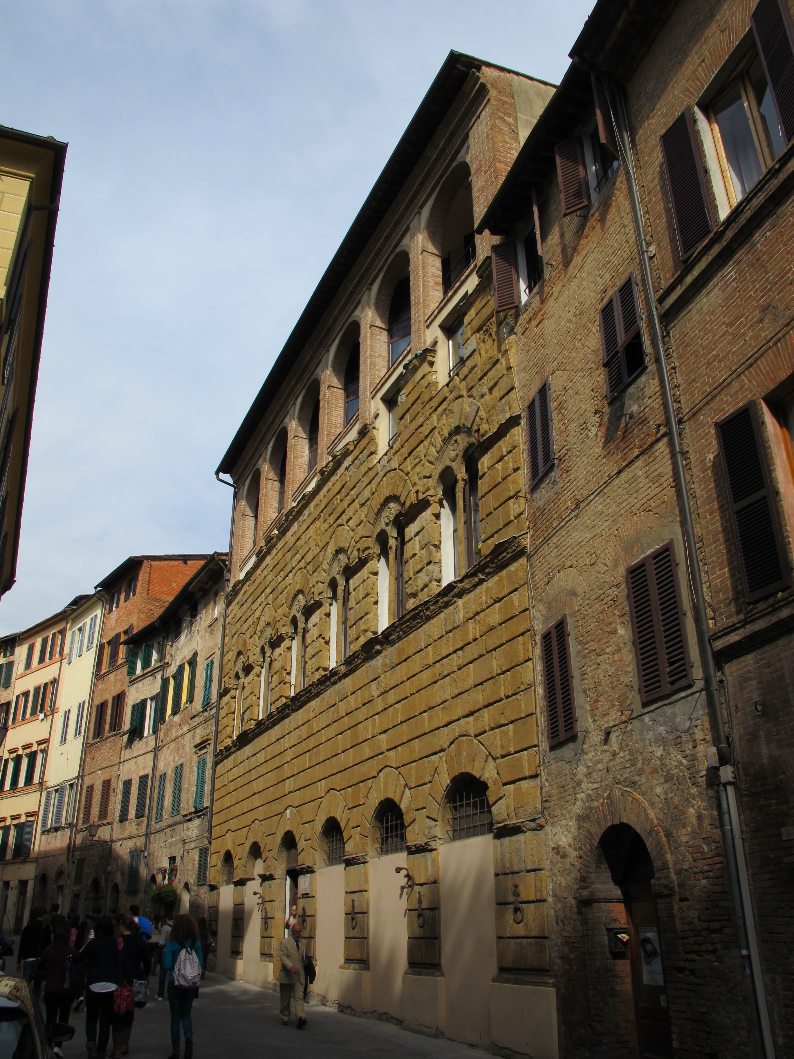 Siena, Via Roma e dintorni